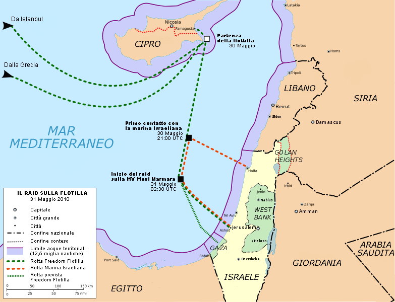 File tradotto da: di Montgomery Traduzione: Wikimanno (msg)